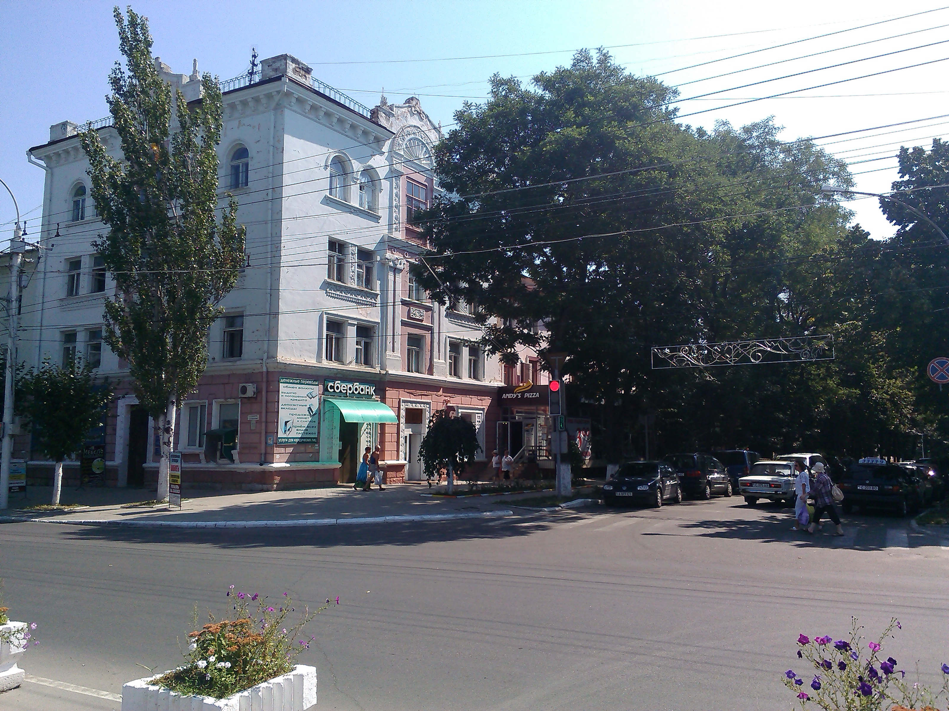 Im Zentrum von Bendery